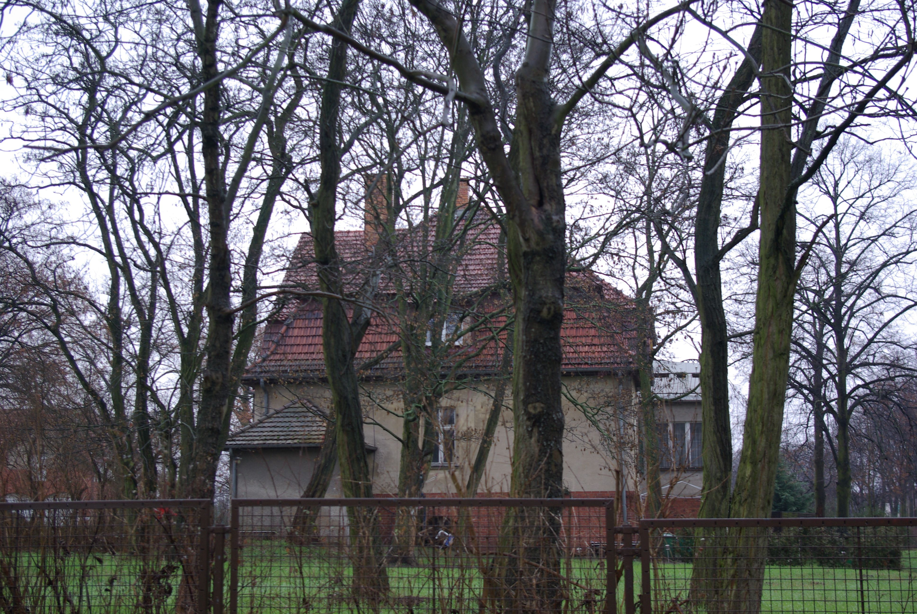 Königs Wusterhausen Ortsteil Deutsch Wusterhausen in Brandenburg. Das Stadtgut mit den Gebäuden steht unter Denkmalschutz.